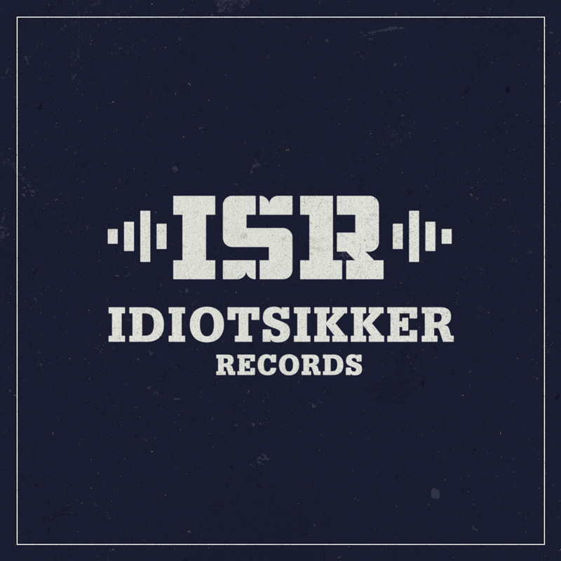 Idiotsikker logo af Bargo